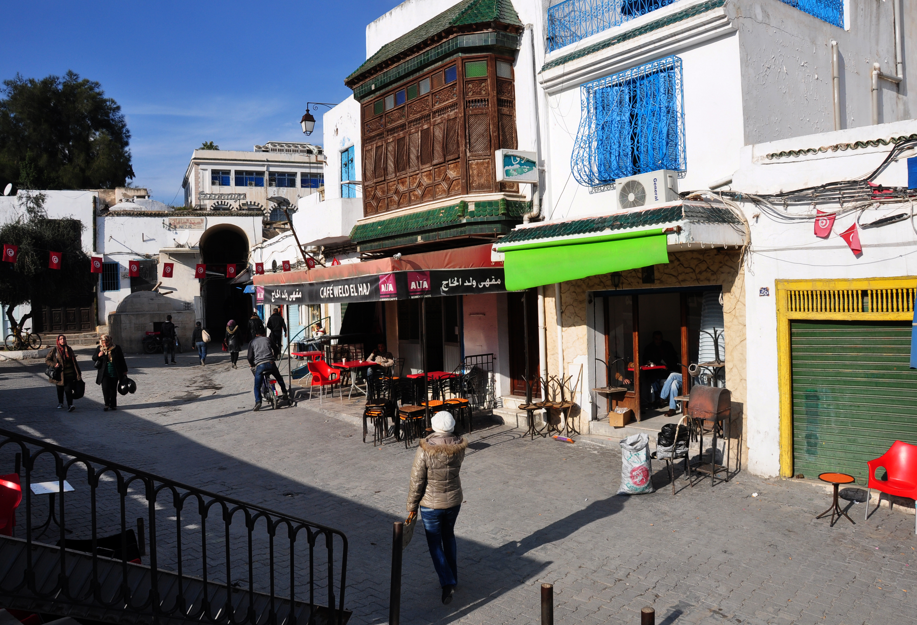 Souk ru des selliers